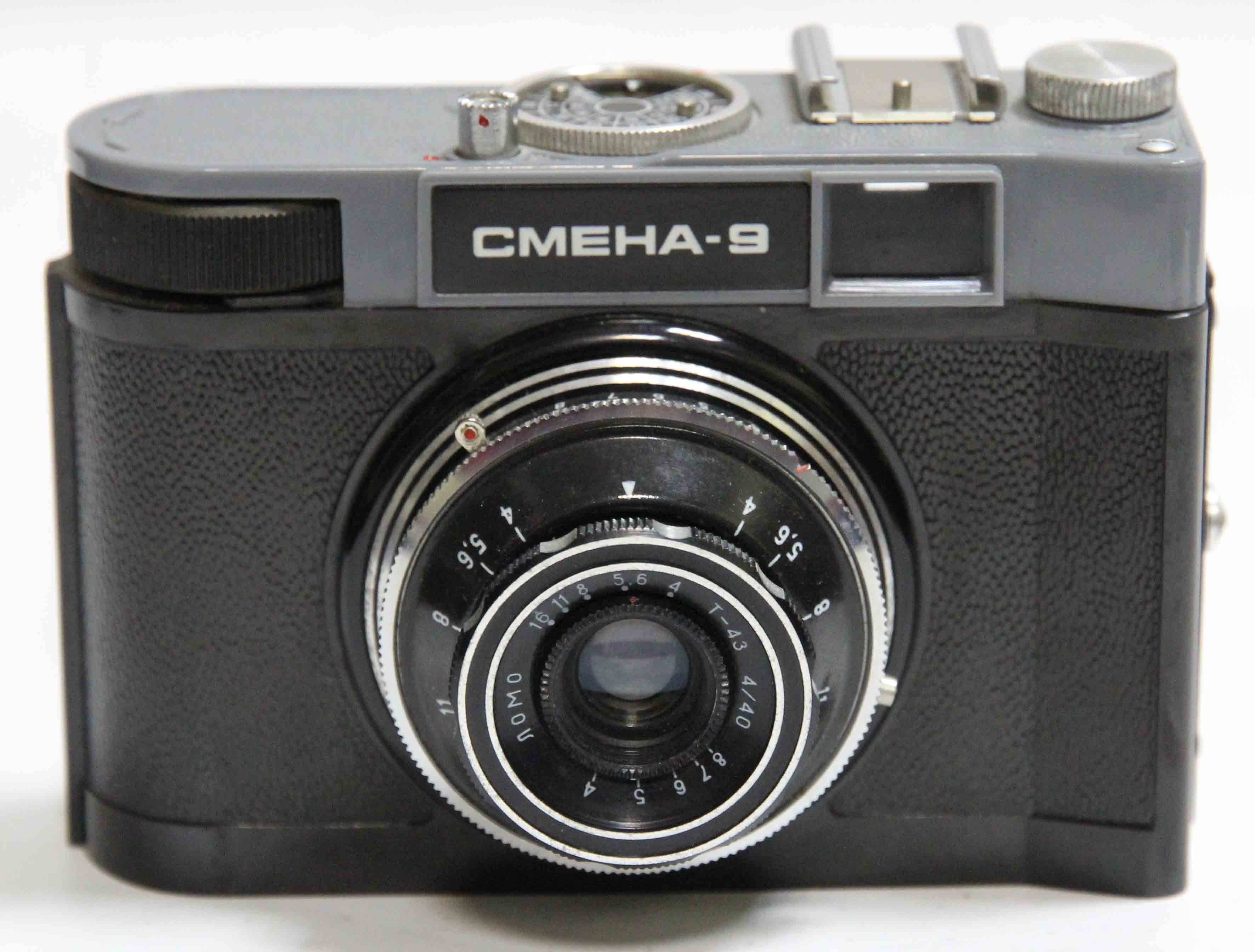 Советский фотоаппарат.